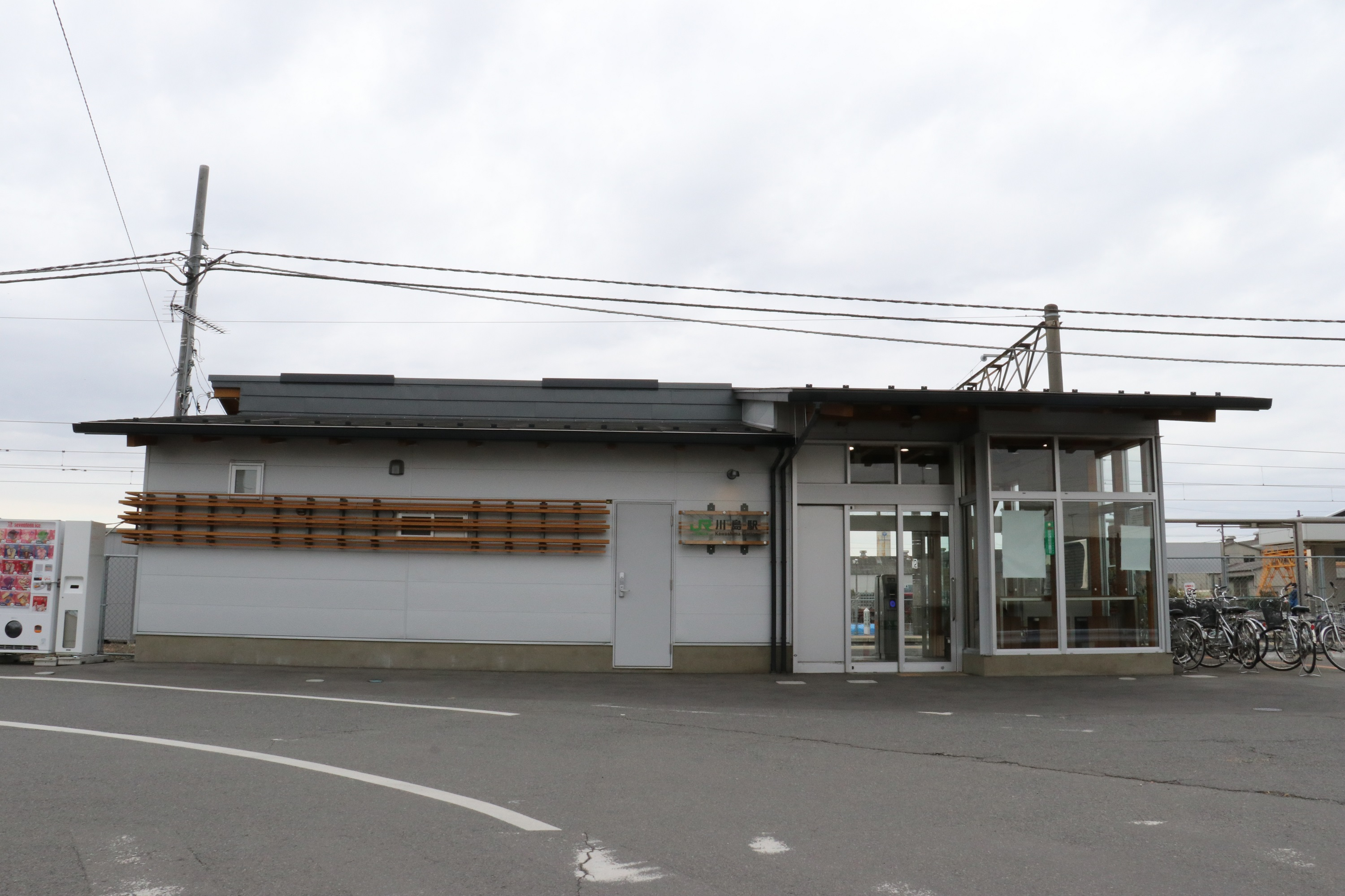 水戸線川島駅